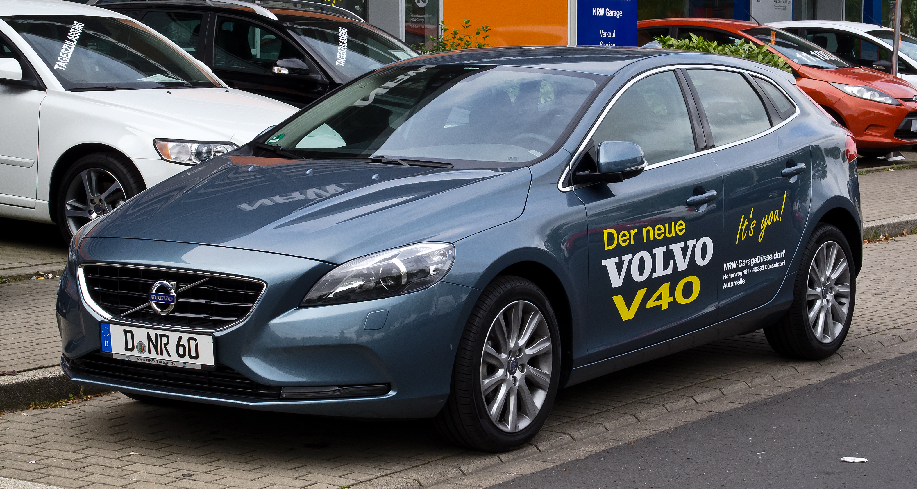 Volvo V40 D2 Summum (II)